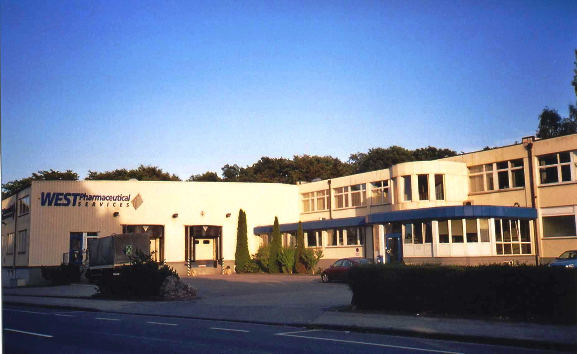 West Pharmaceutical Services in Eschweiler-Pumpe-Stich, Hauptgebäude mit Empfang